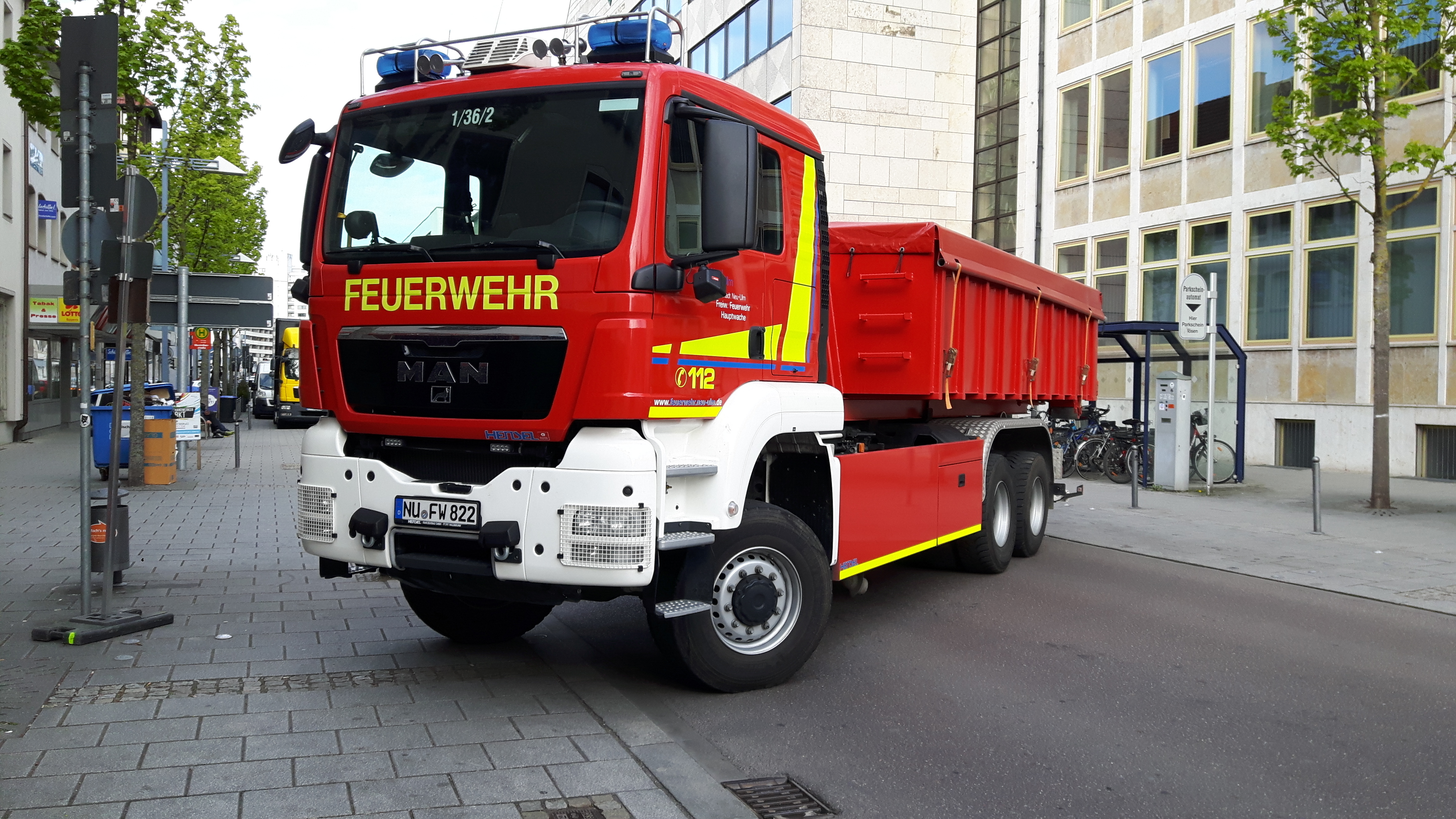 Wechselladerfahrzeug (WLF) der Freiwilligen Feuerwehr Neu-Ulm mit Abrollbehälter Mulde